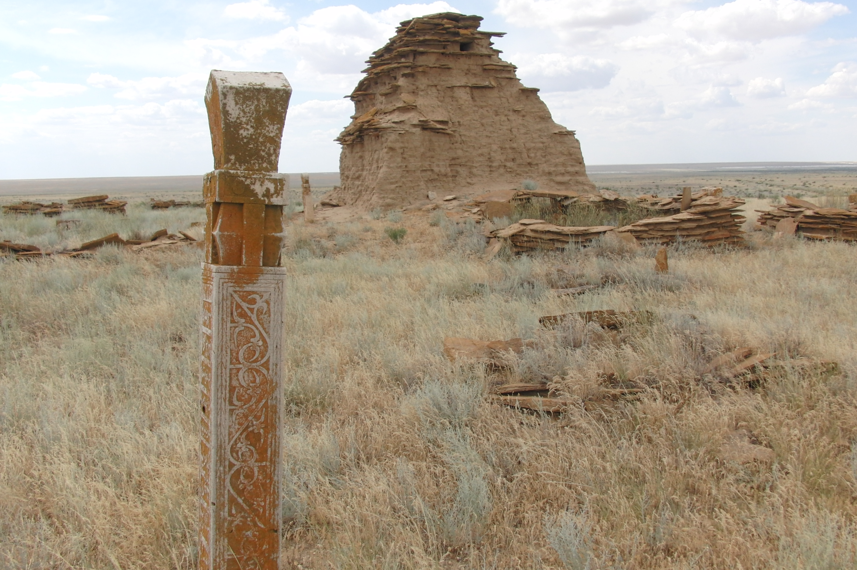 древнее кладбище в степи у Эмбы